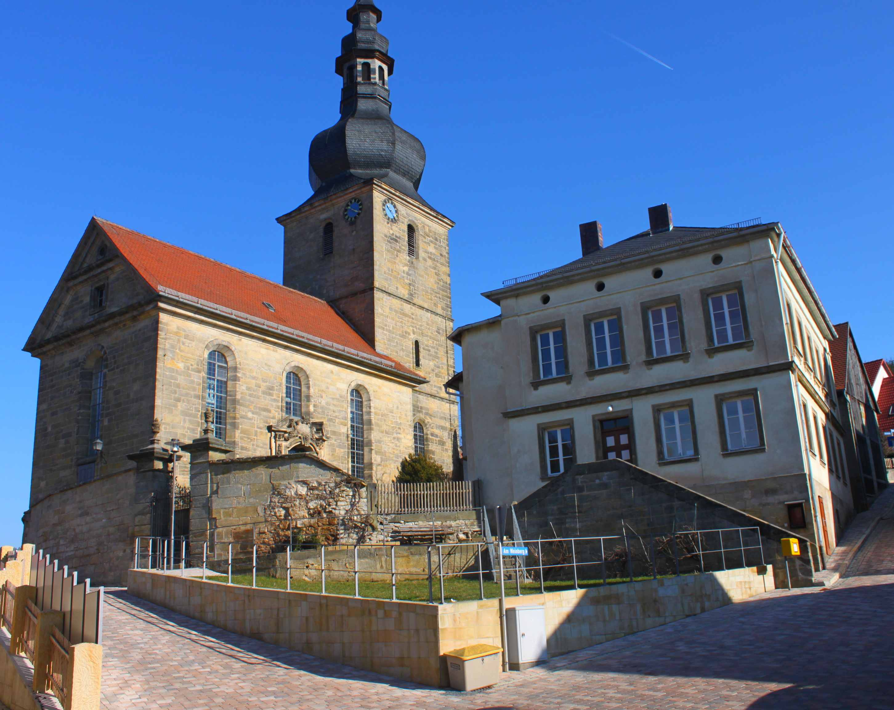 Die St.-Jakobs-Kirche in Obernsees